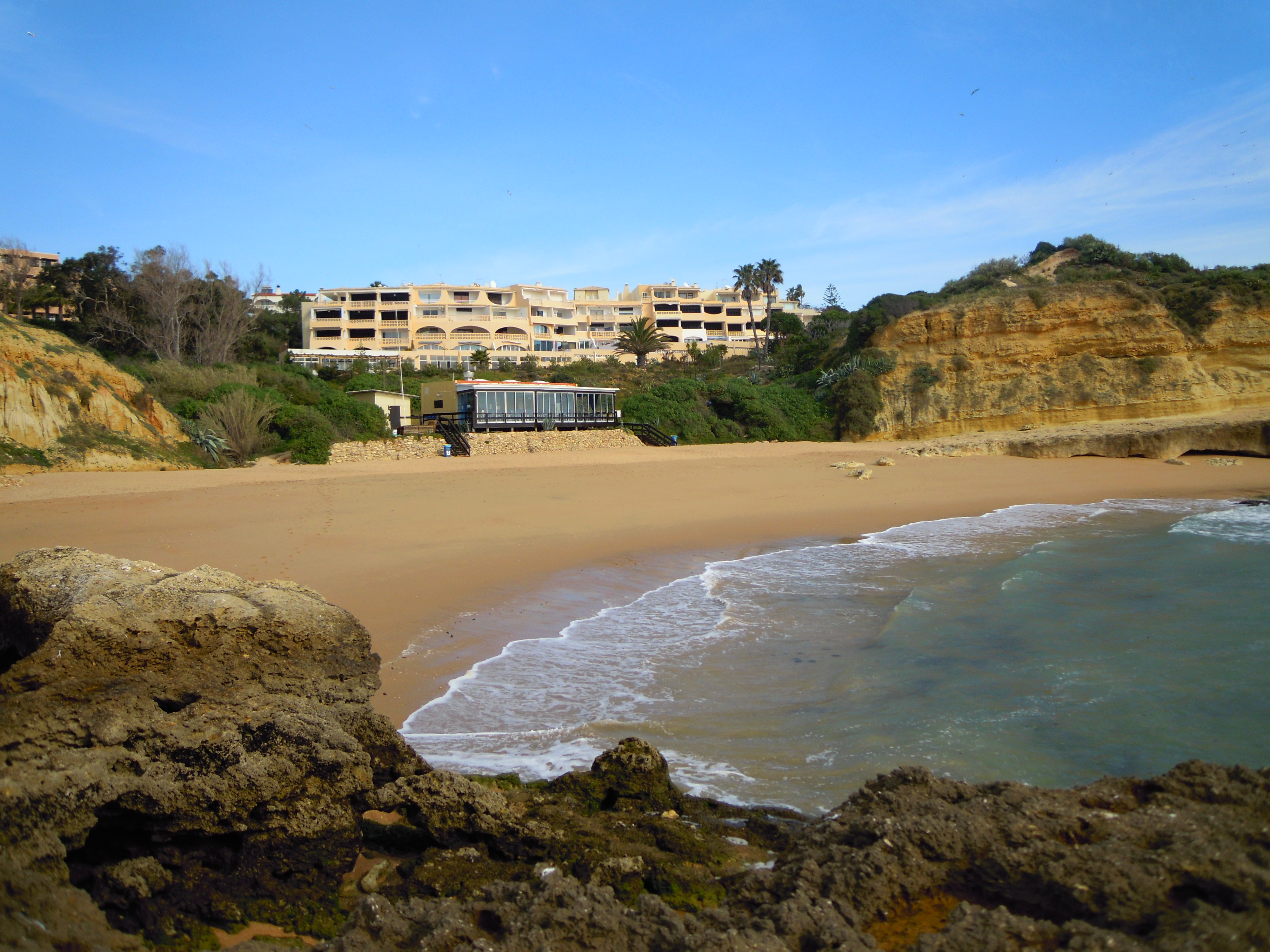 Praia dos Aveiros in the Areias de São João of Albufeira, Algarve, Portugal.